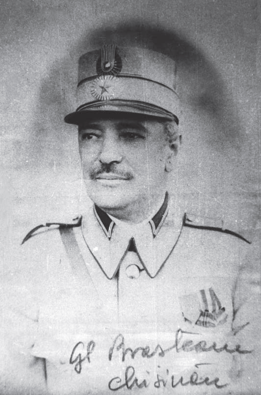 Generalul Ernest Brosteanu într-o fotografie din 1917, la Chişinău